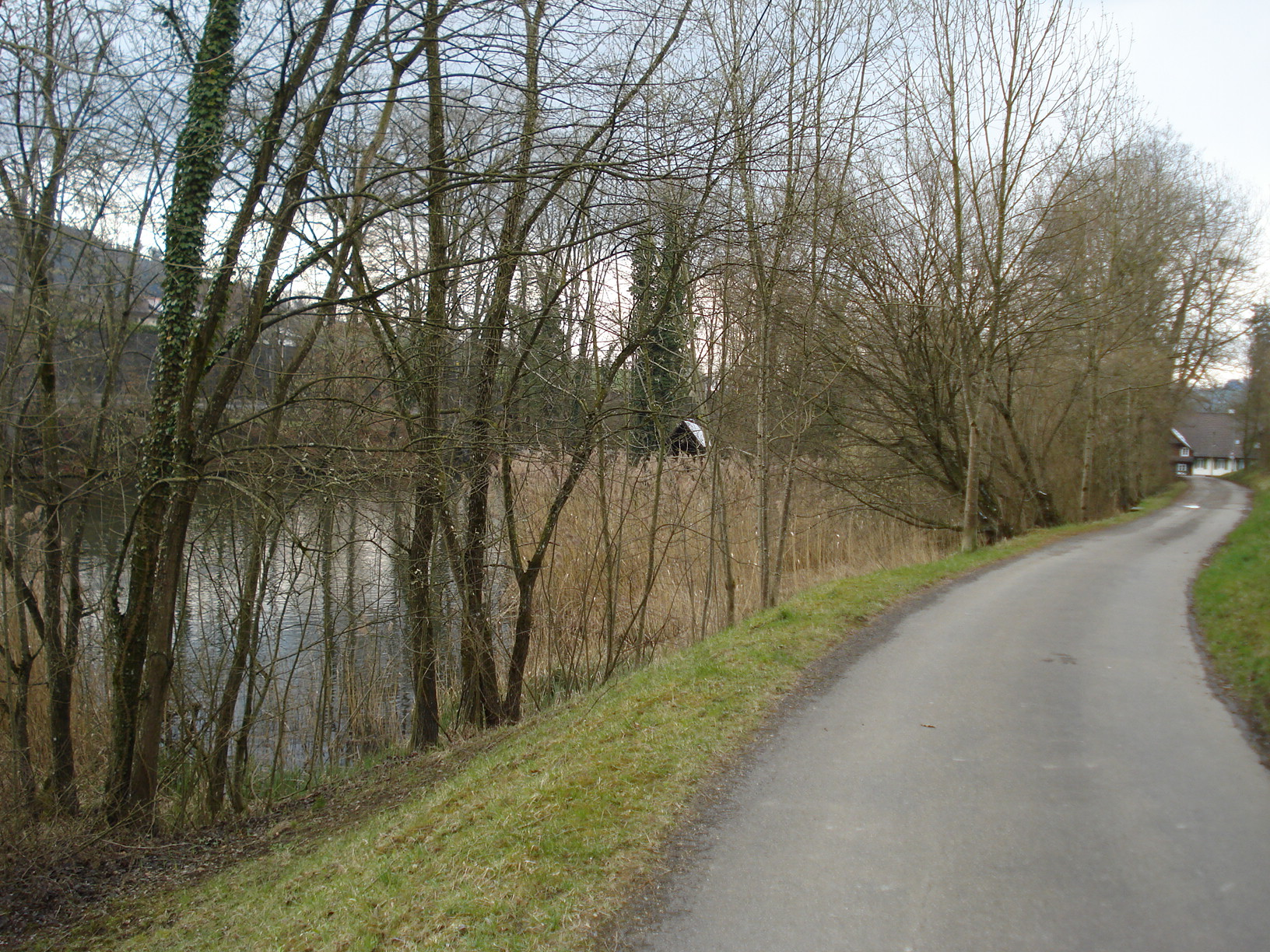 BinzmühleweiherRotkreuz